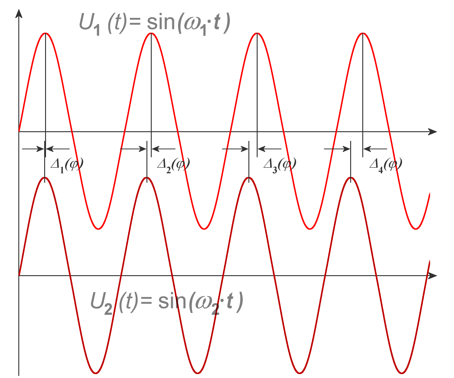 Prinzip der Entfernungsmessung mit zwei parallel arbeitenden CW-Radargeräten mit geringfügig unterschiedlicher Frequenz